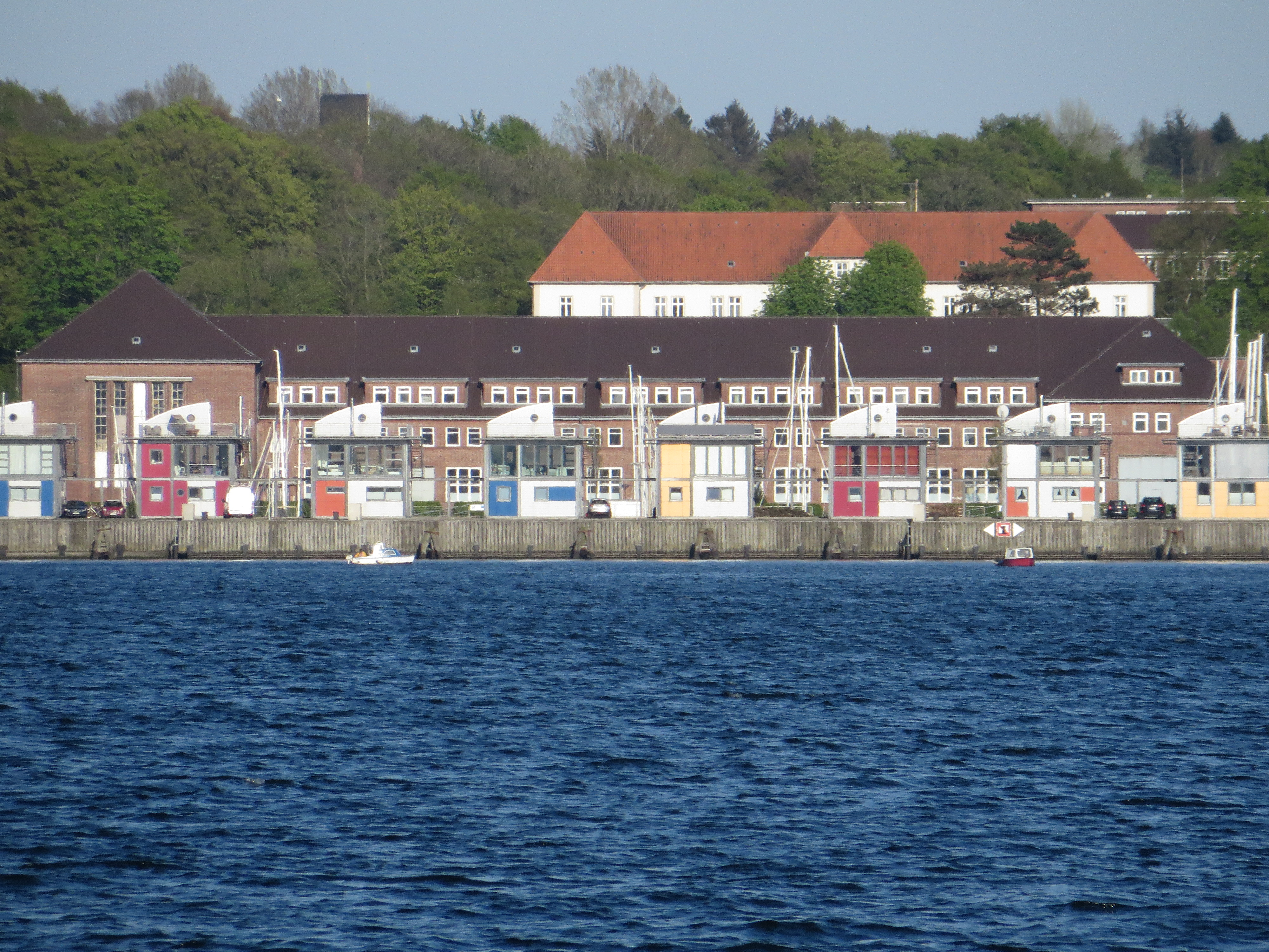 Sonwik mit Tirpitz-Kaserne der Torpedostation der kaiserlichen Marine (1901-1902), Flensburg 2014, Bild 03